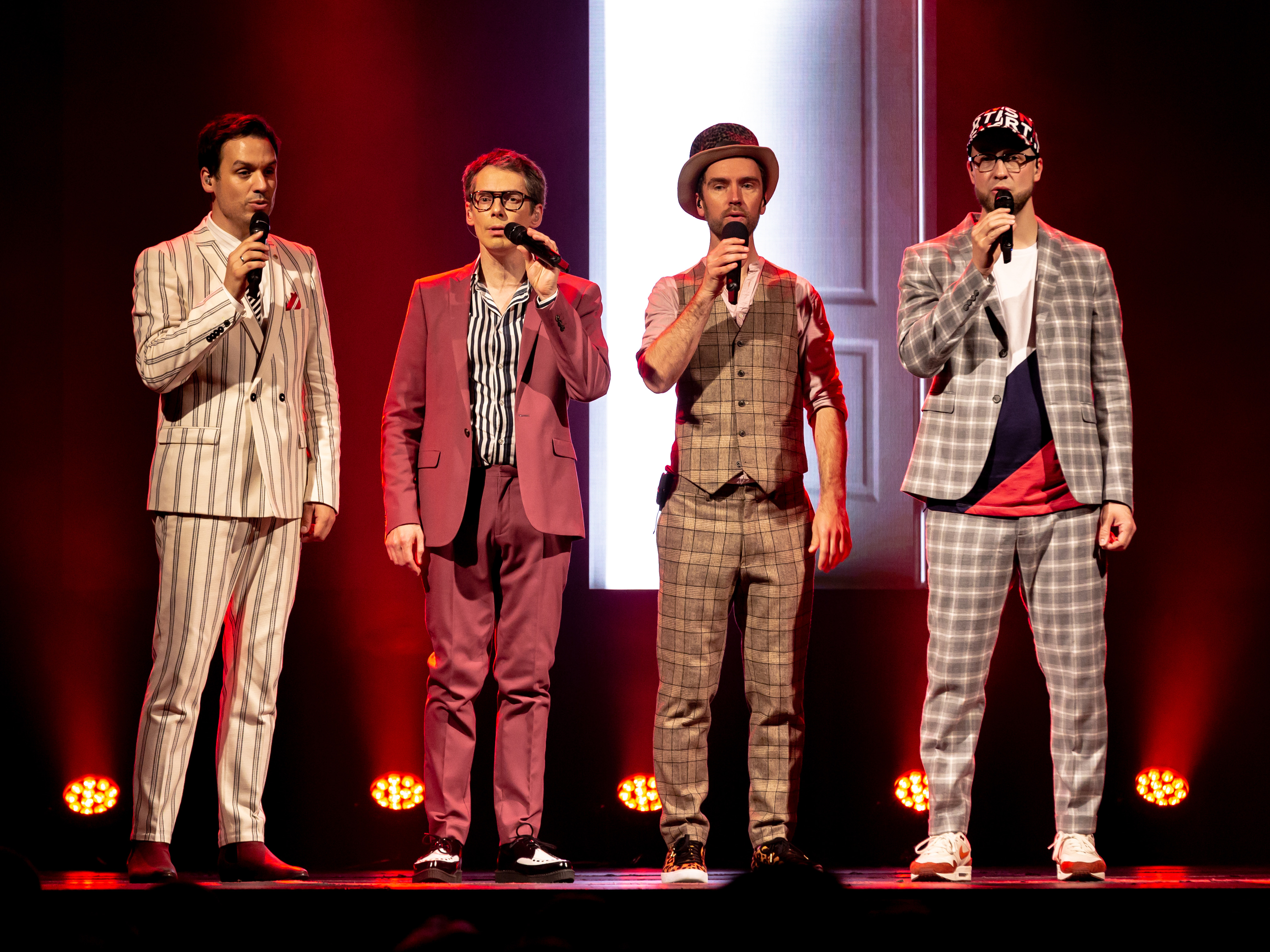 MAYBEBOP, A-cappella-Gruppe, mit Jan Bürger, Oliver Gies, Christoph Hiller, Lukas Teske